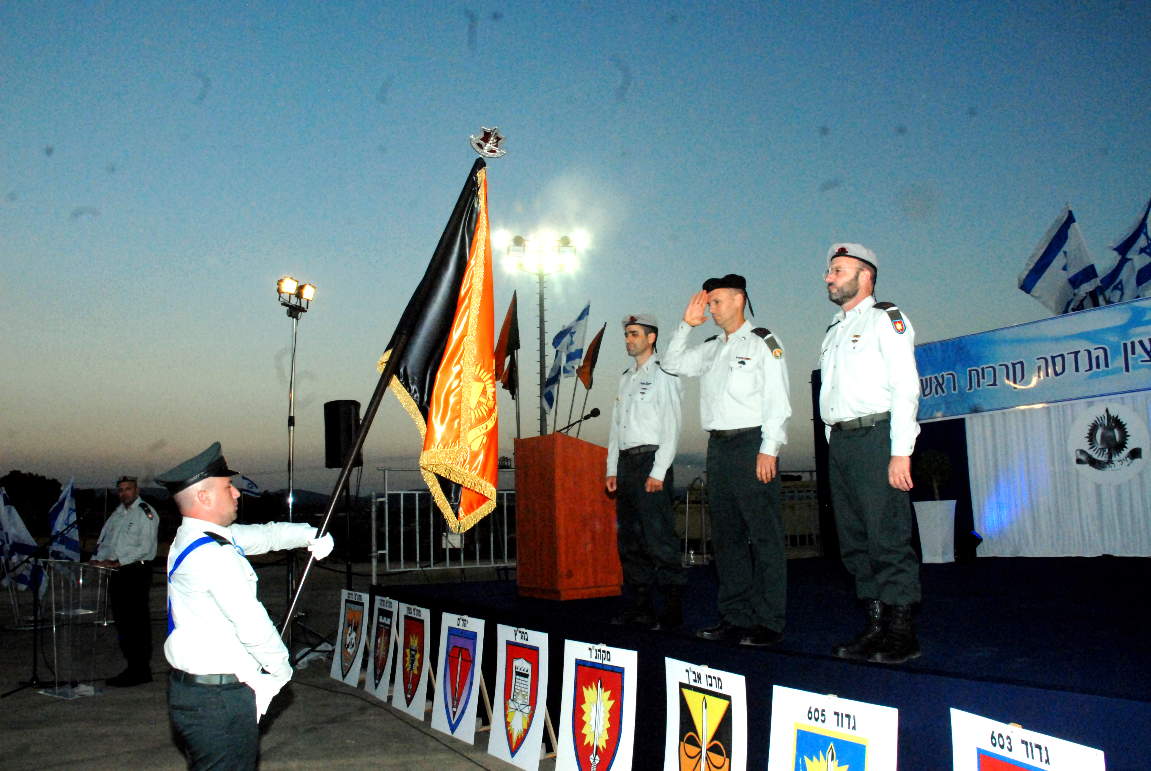 תא"ל יוסי מורלי האלוף גיא צור תא"ל אושרי לוגסי בטקס החלפת קהנ"ר